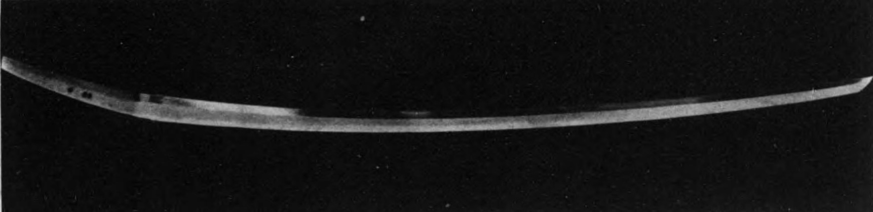 石上神宮所蔵の太刀。銘「義憲作」。平安時代の作。奈良県指定有形文化財。